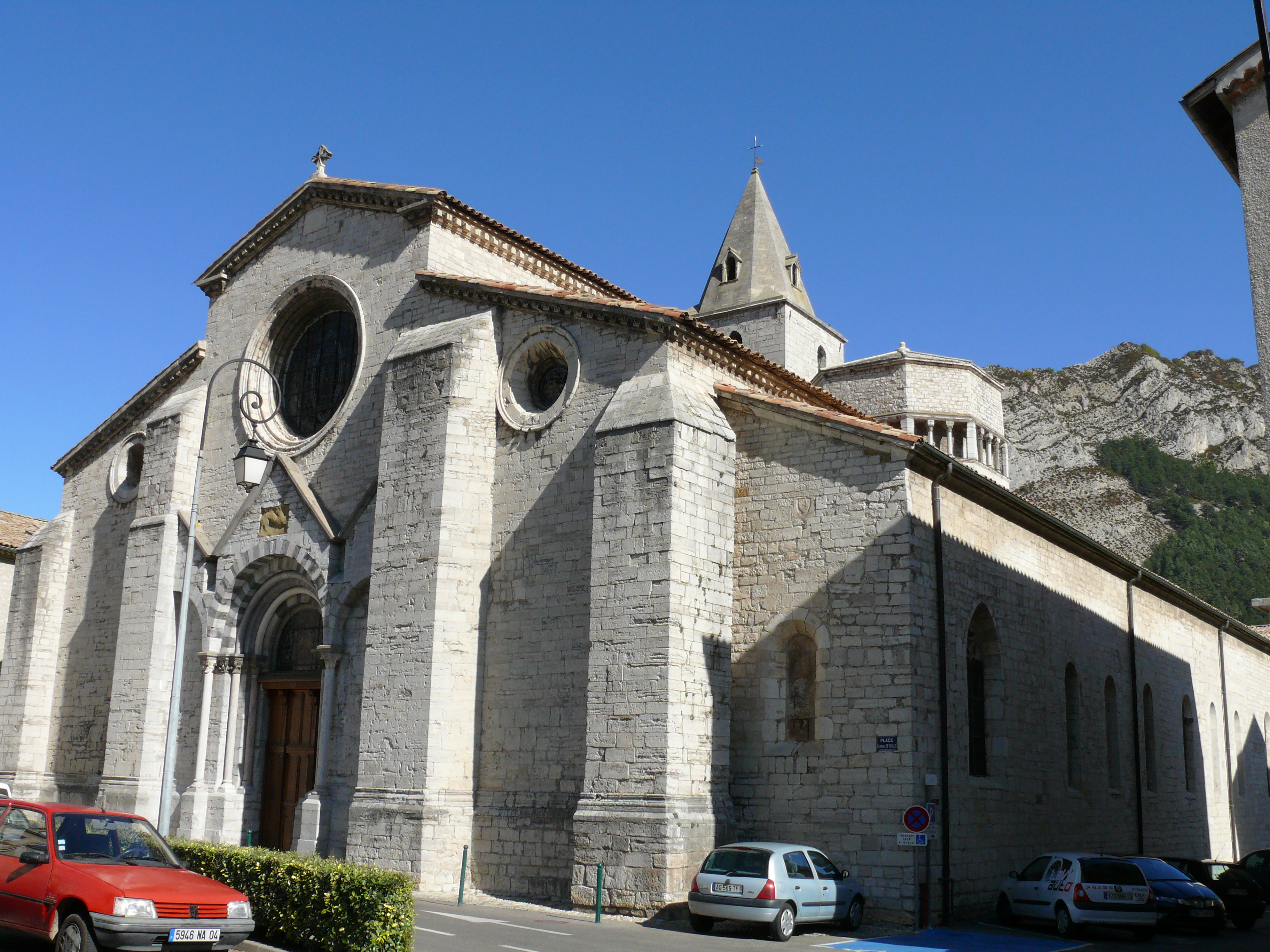 Cathédrale Notre-Dame-des-Pommiers de Sisteron